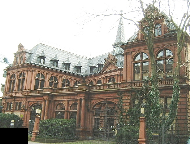 ehemaliger Livingstonscher Pferdestall im Westend, Ulmenstraße in Frankfurt am Main. Errichtet wohl 1880 nach einem Entwurf von C. L. Schmidt mit Hofarkaden, Uhrtürmchen etc. Der Livingstonsche Pferdestall ist heute ein Bürgerhaus